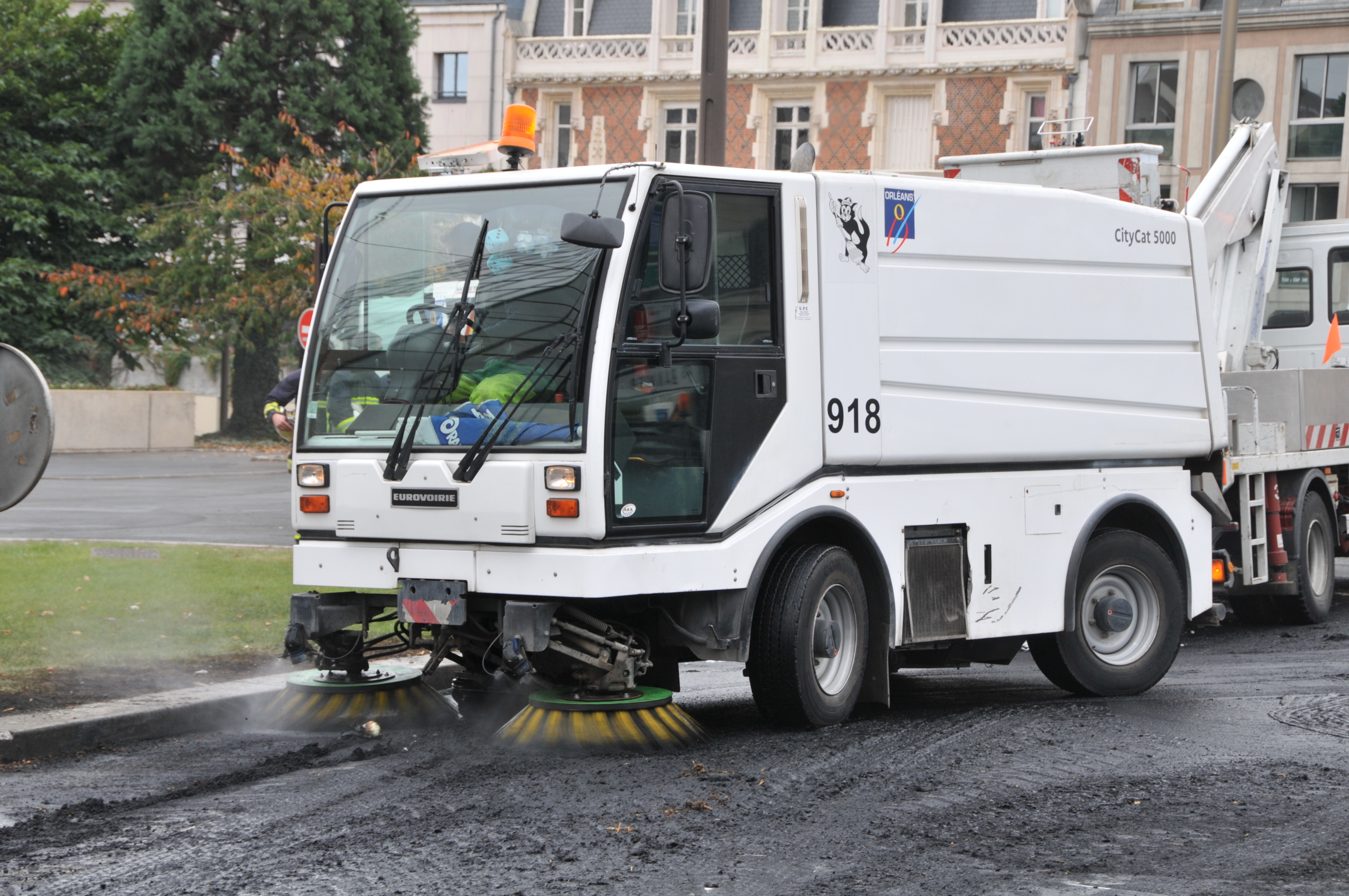 Après la manifestation d'agriculteurs à Orléans le 16 octobre 2009.